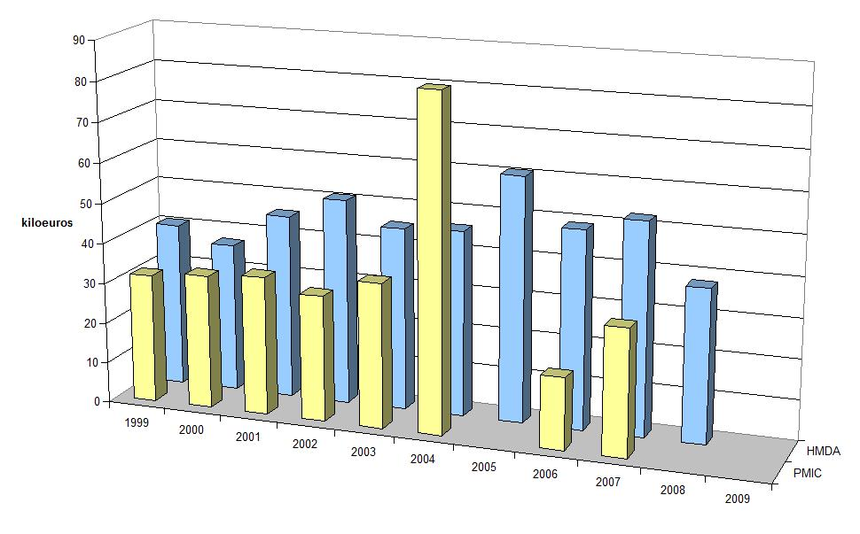 Montant des prêts hypotécaires, à Hartford (Michigan, Etats-Unis).